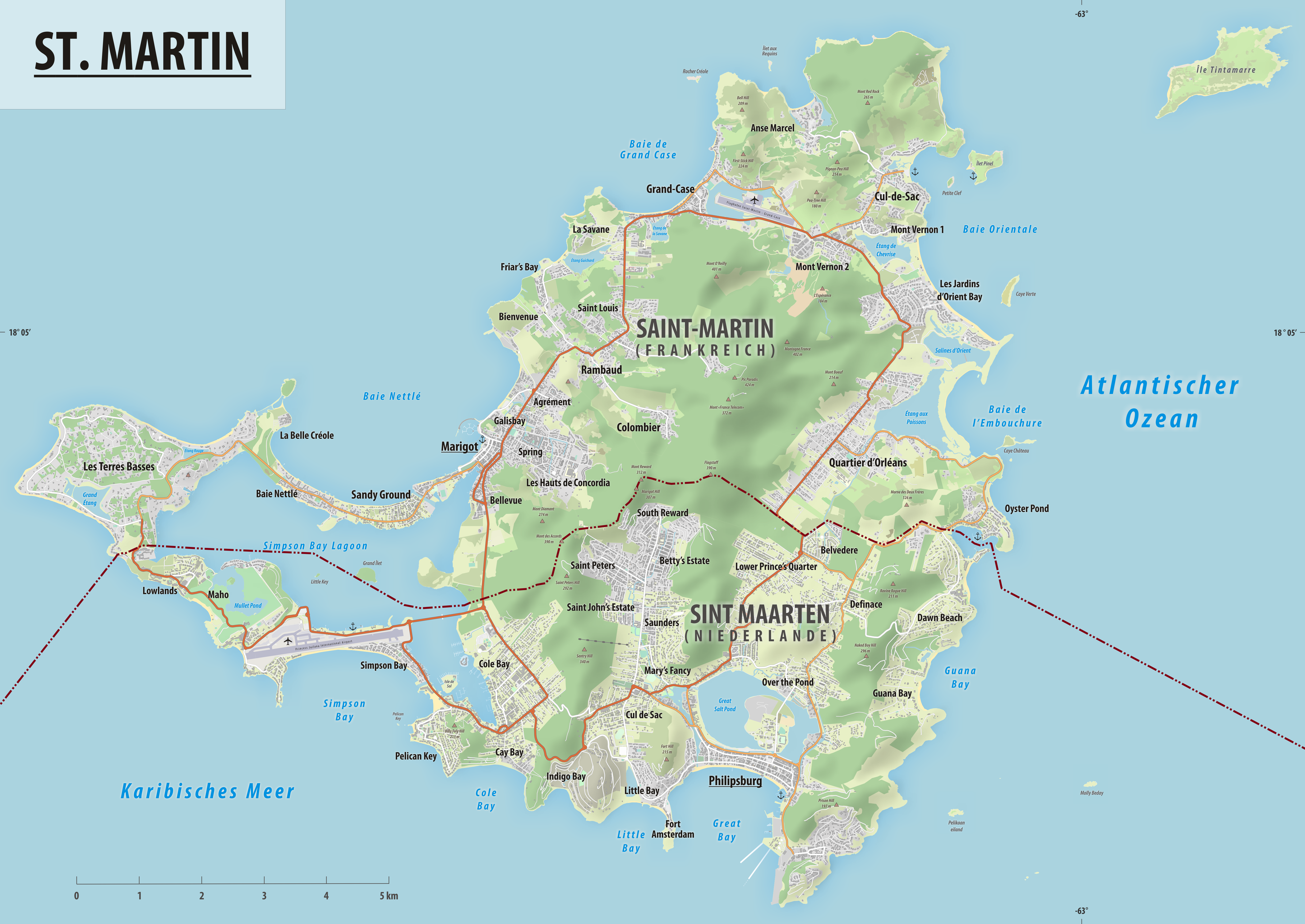 Reliefkarte des Grenzverlaufes zwischen Frankreich und Monaco